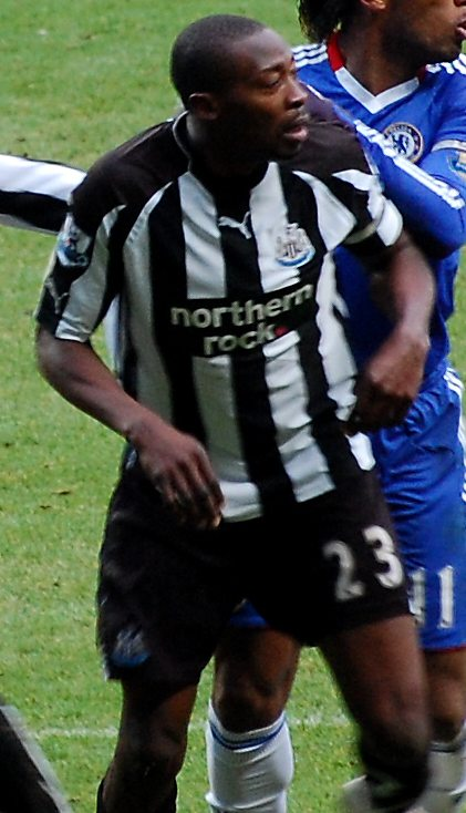 Shola Ameobi, cropped